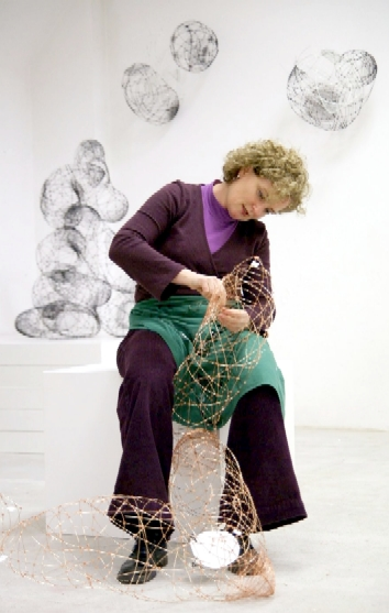 Die Bildhauerin Bettina Lüdicke während der Arbeit im Atelier